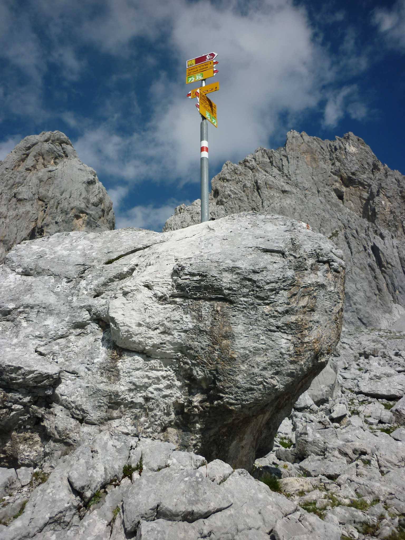 Wegweiser Prättigauer Höhenweg, Walserweg Graubünden, unterhalb Drusentor, Prättigau, Schweiz